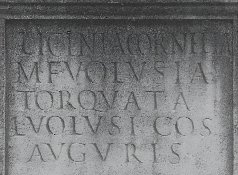 Funerary inscription of Licinia Cornelia Volusia Torquata. CIL VI, 31726. Rome, Roman National Museum, Baths of Diocletian (Museo nazionale romano, Terme di Diocleziano). Licinia Cornelia / M(arci) f(ilia) Volusia / Torquata / L(uci) Volusi co(n)s(ulis) / auguris. Licinia Cornelia Volusia Torquata, the daughter of Marcus, the wife of Lucius Volusius, consul, augur. Rome, the tomb of Licinii.